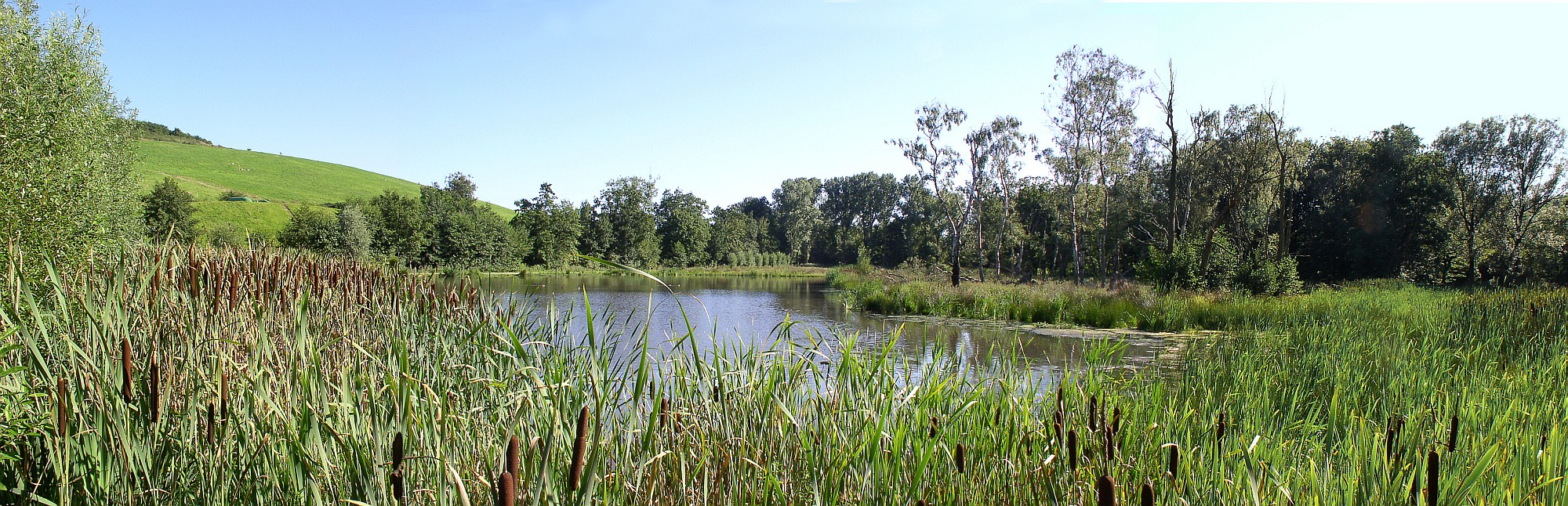 Der Schilfsee unmittelbar südlich der Eichkampsiedlung am Fuß der inzwischen teils begrünten Deponiehalde markiert die ungefähre geographische Mitte des Gelsenkirchener Stadtteils Resser Mark und liegt im Landschaftsschutzgebiet „Resser Mark/Im Emscherbruch“